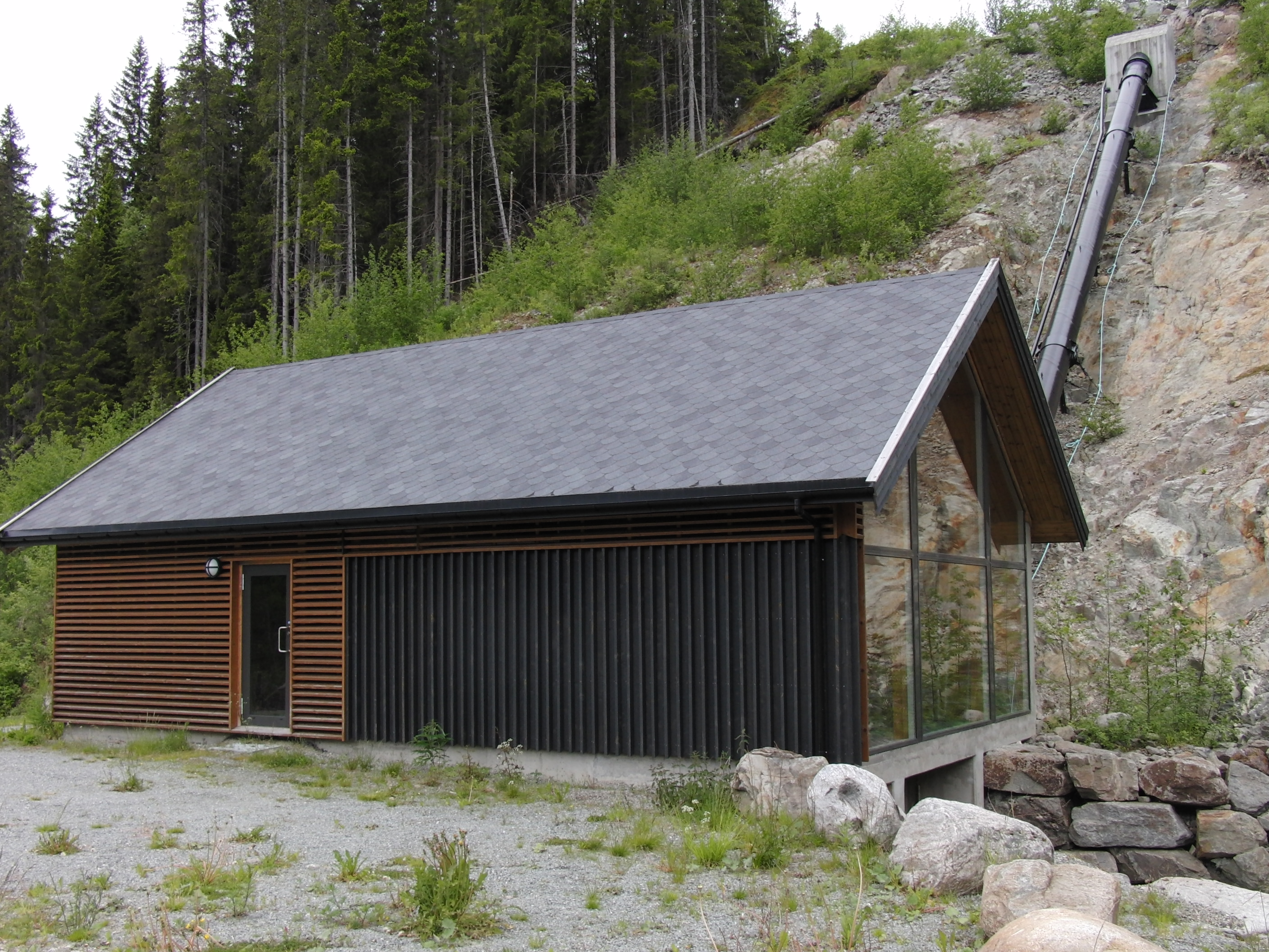 Tua kraftverk